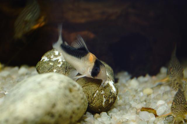 Corydoras duplicareus